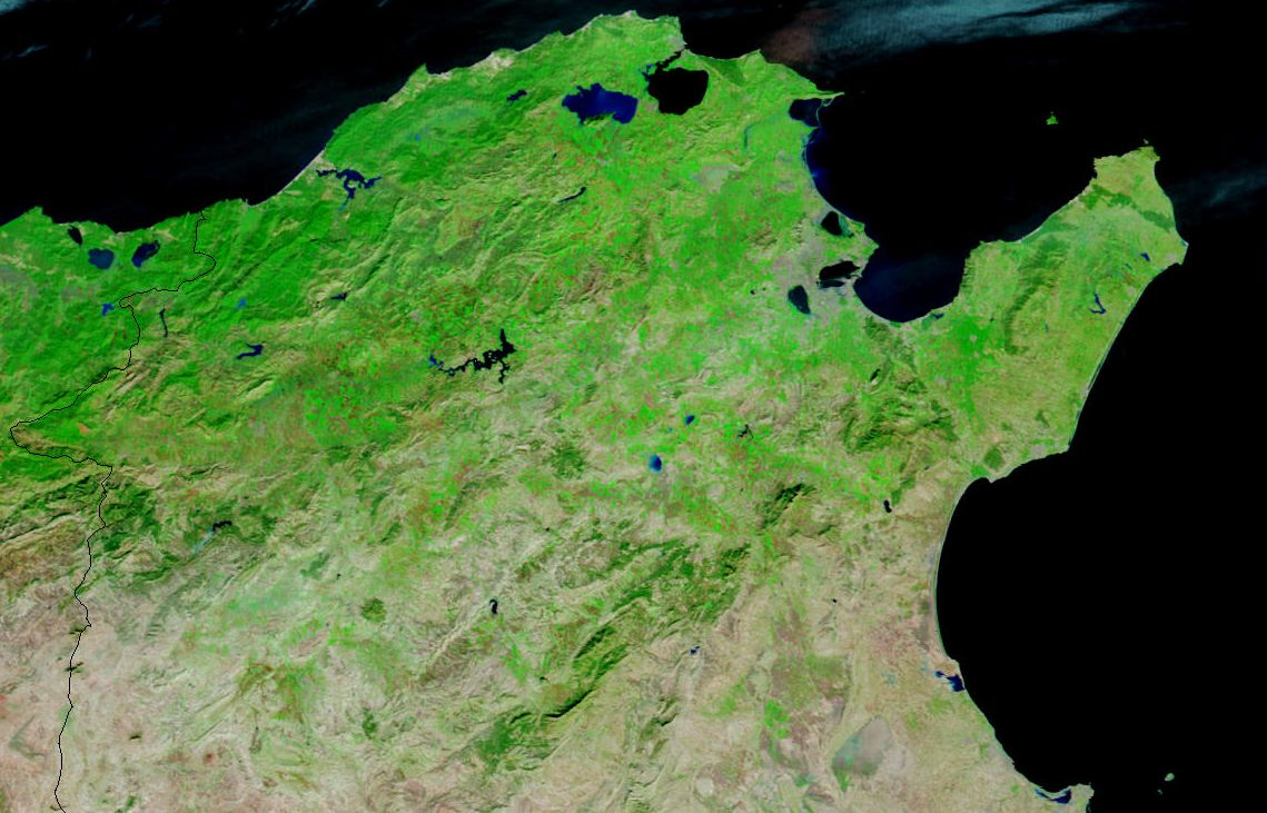 Image satellite du Nord de la Tunisie